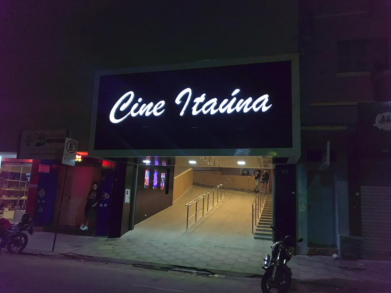 Área interna do Cine Itaúna de Caratinga, MG, pertencente à rede Cine Filmes